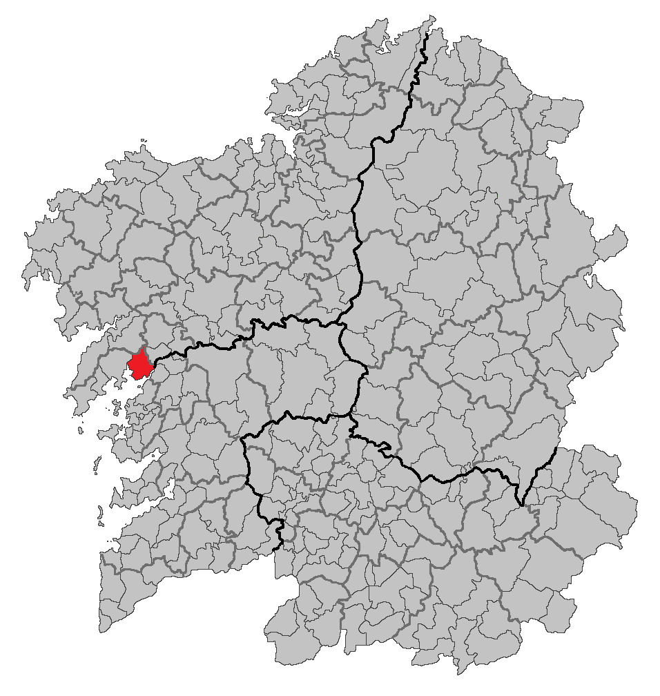 Mapa coa localización do concello de Rianxo.